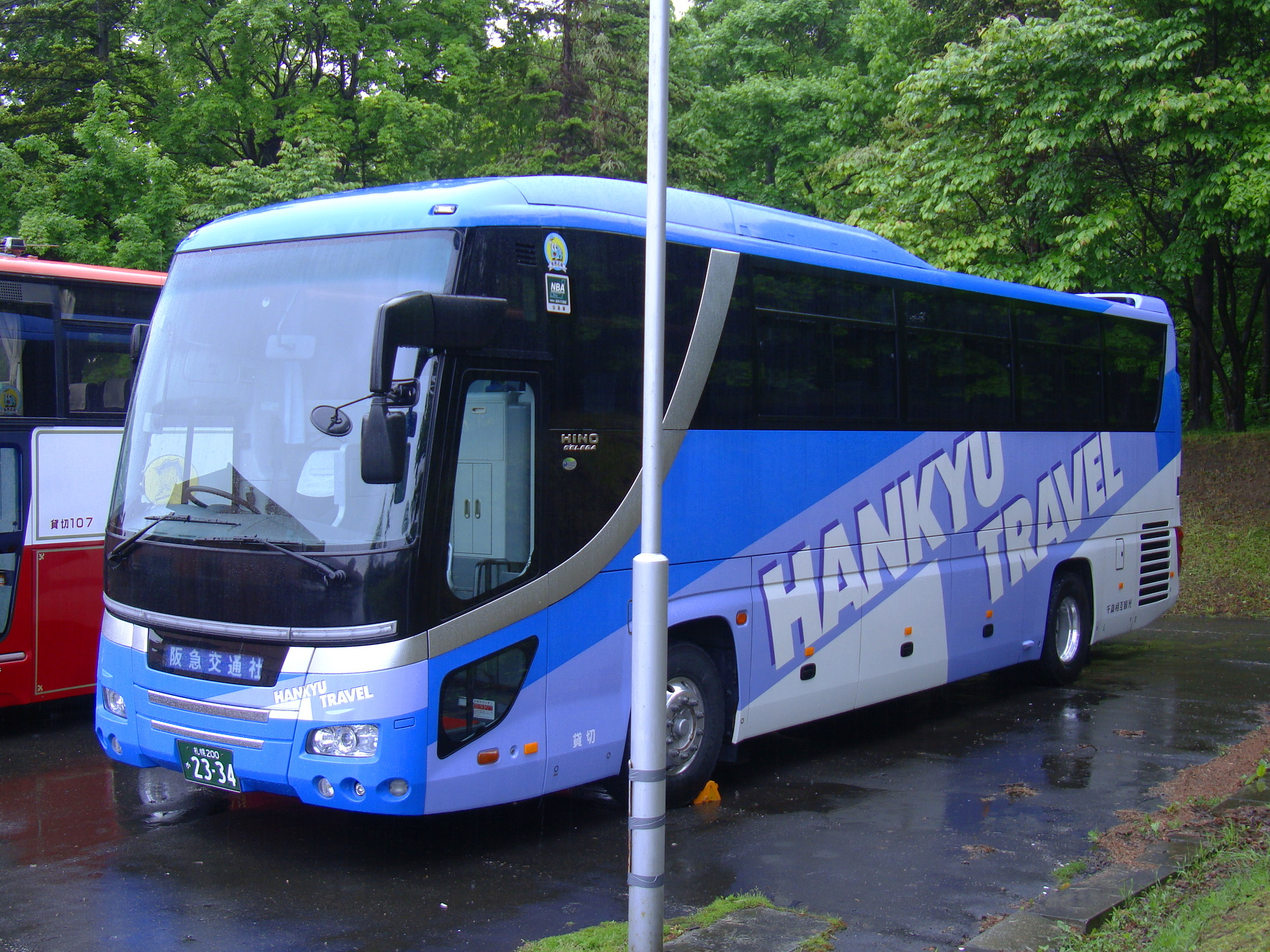 Hankyu Travel